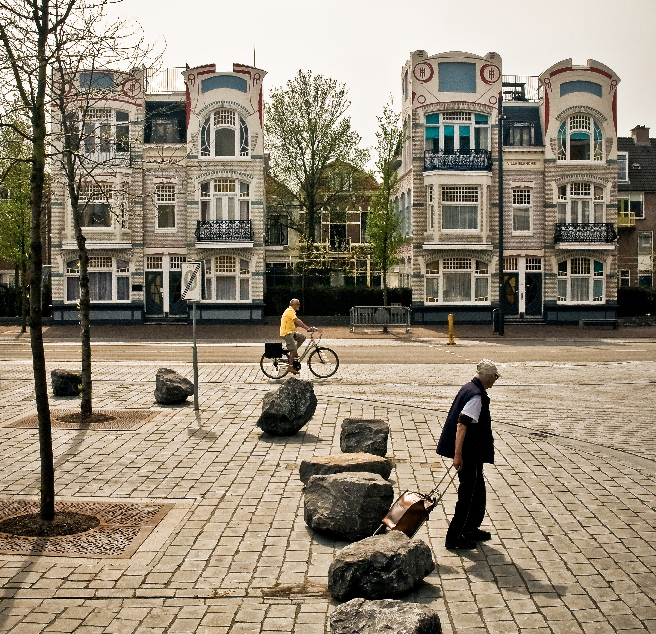 Twee middelste loodsenhuizen (van vier) Spuistraat Vlissingen